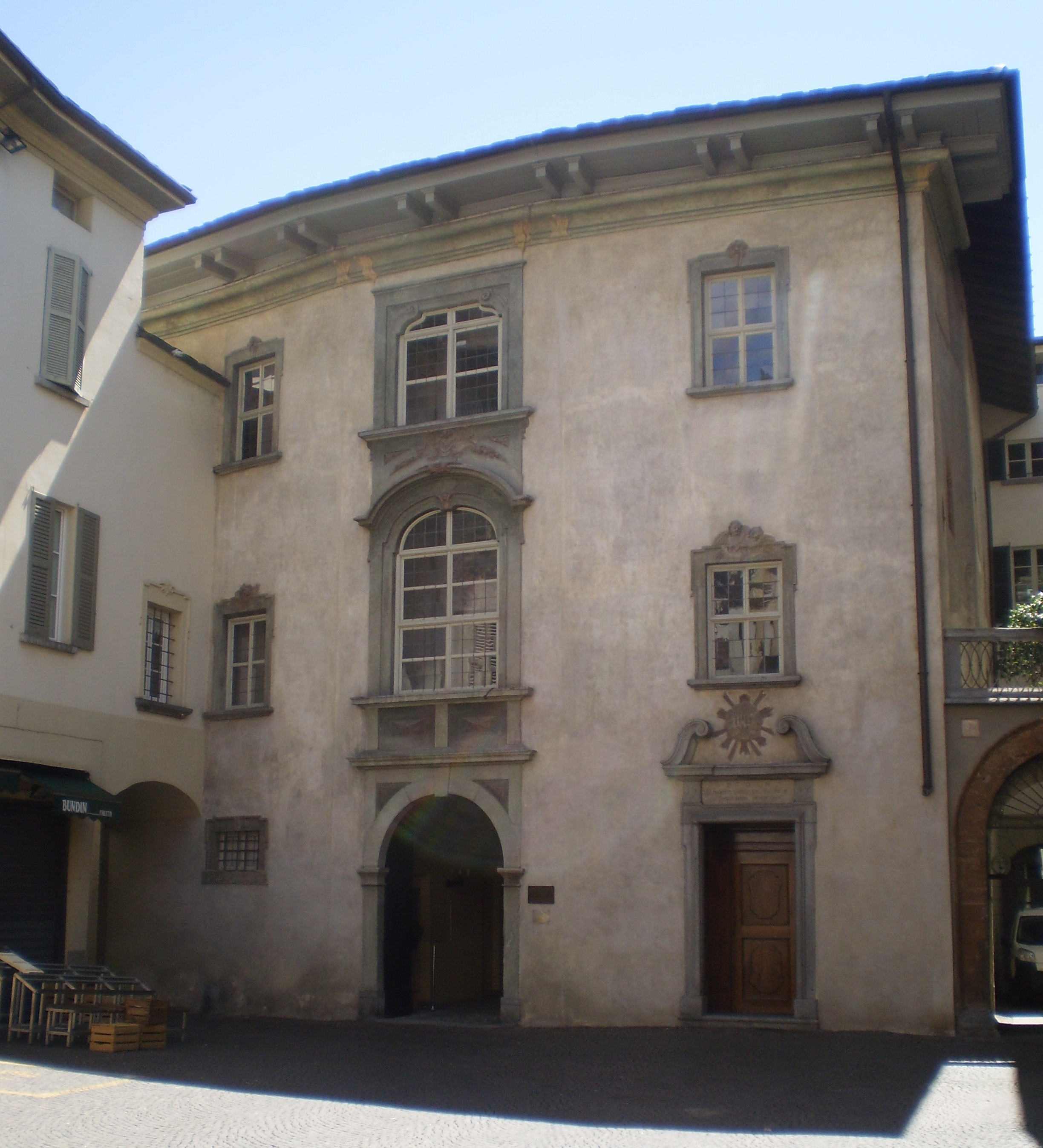 La facciata di palazzo Sertoli (XVII-XVIII sec.) in Piazza Quadrivio, a Sondrio.